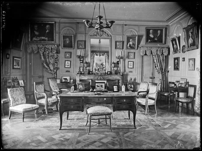 Château de Blossac Intérieur : bureau par Gustave William Lemaire entre 1900 et 1920.